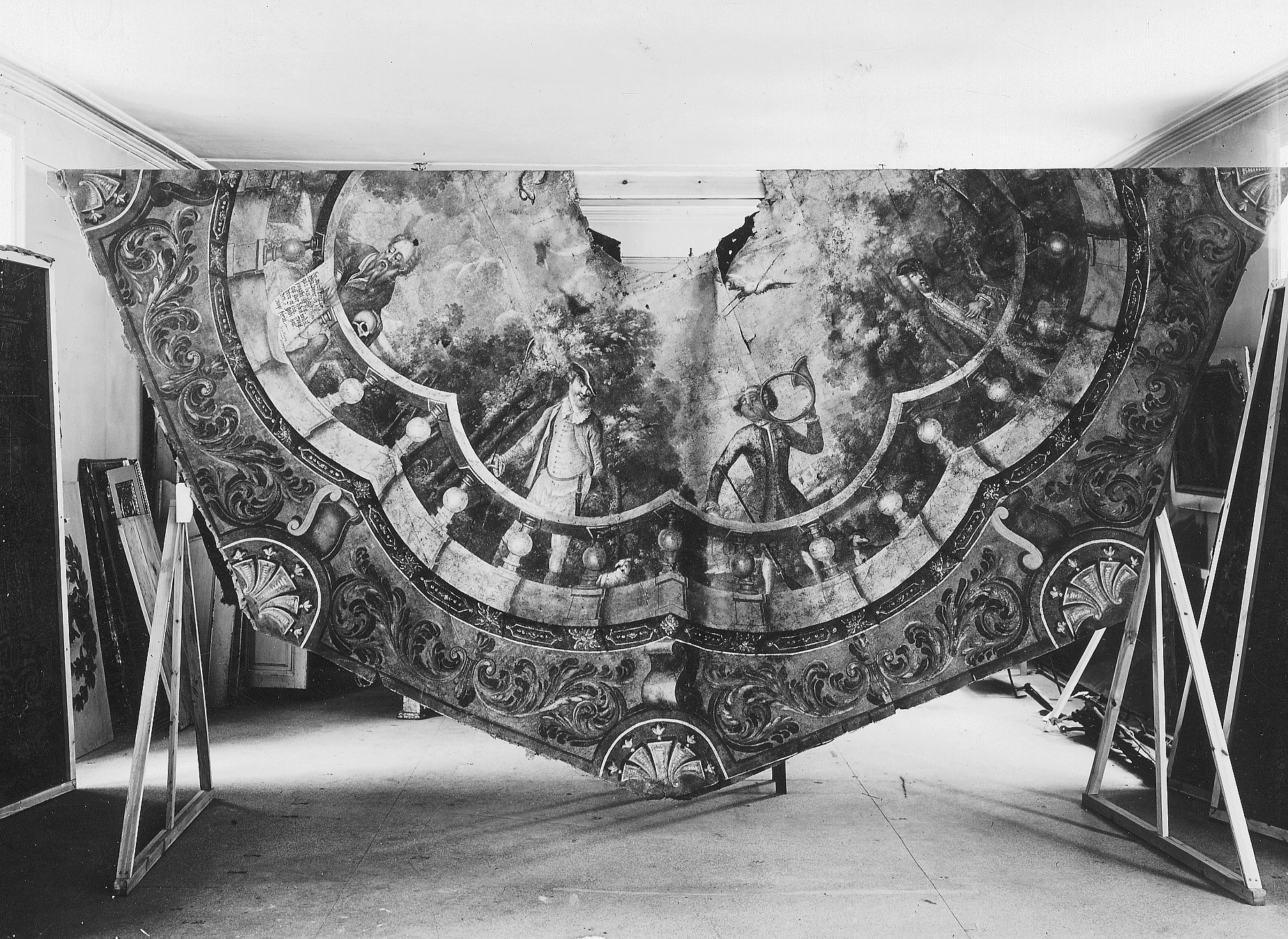 Lilla Blecktornet, lusthusets takmålning i Stadsmuseets samling